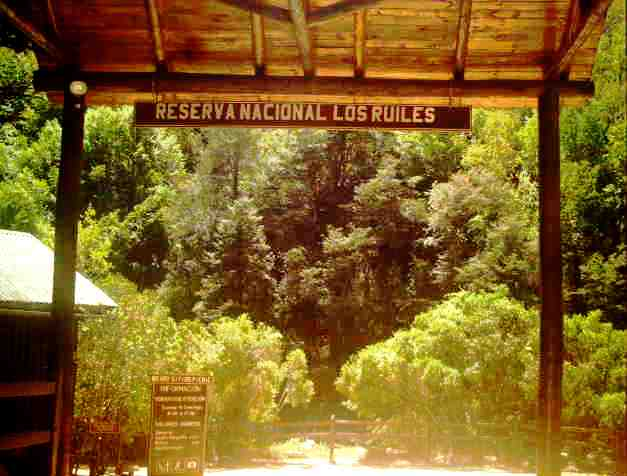 Entrada a la Reserva Nacional Los Ruiles, en Chanco